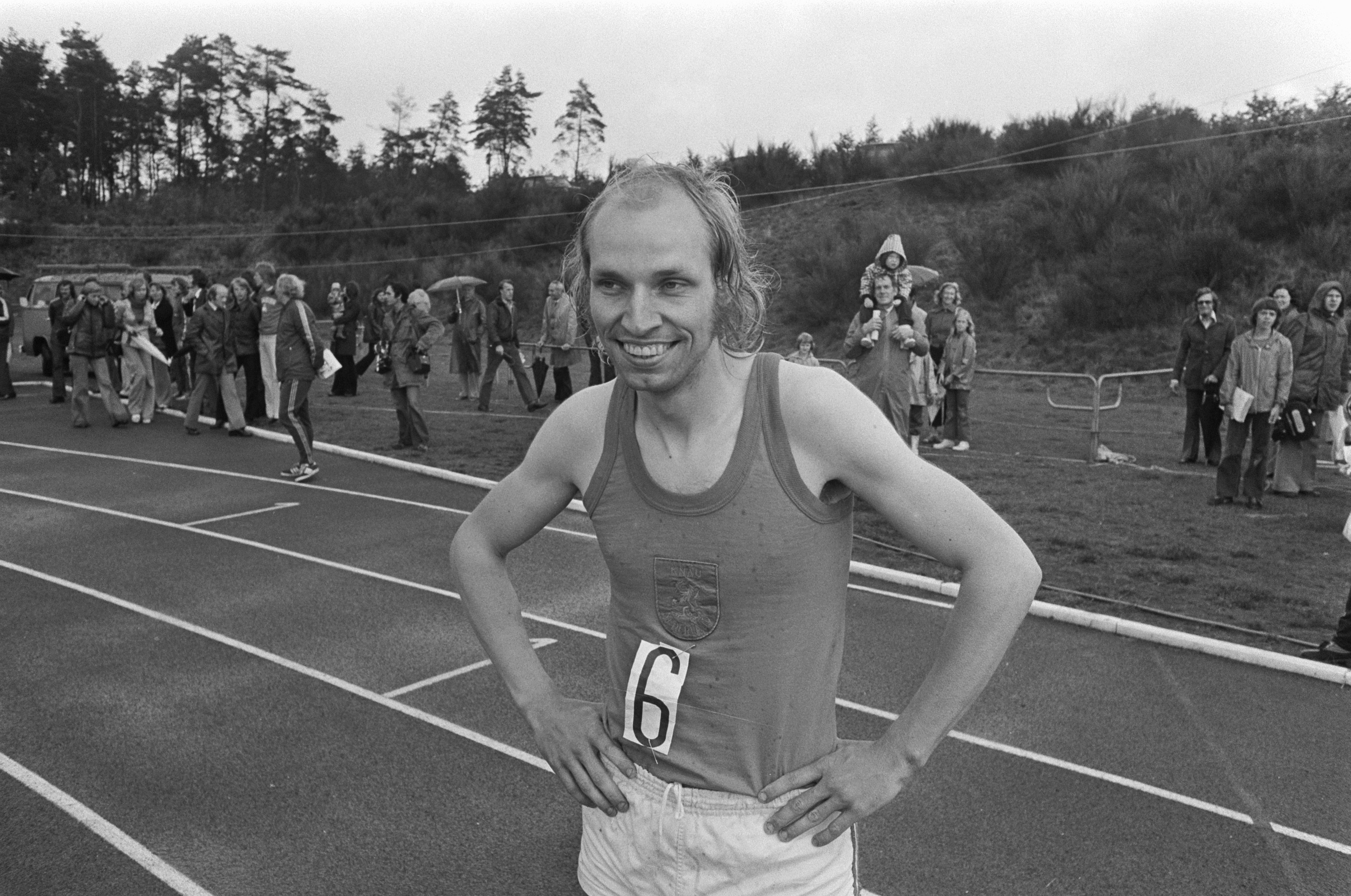 Collectie / Archief : Fotocollectie Anefo Reportage / Serie : [ onbekend ] Beschrijving : Atletiekinterland Nederland, Duitsland B, Belgie op Papendal; Jan Struyk Datum : 11 augustus 1974 Locatie : België, Duitsland, Nederland Trefwoorden : atletiek Instellingsnaam : Papendal Fotograaf : Verhoeff, Bert / Anefo Auteursrechthebbende : Nationaal Archief Materiaalsoort : Negatief (zwart/wit) Nummer archiefinventaris : bekijk toegang 2.24.01.05 Bestanddeelnummer : 927-3809